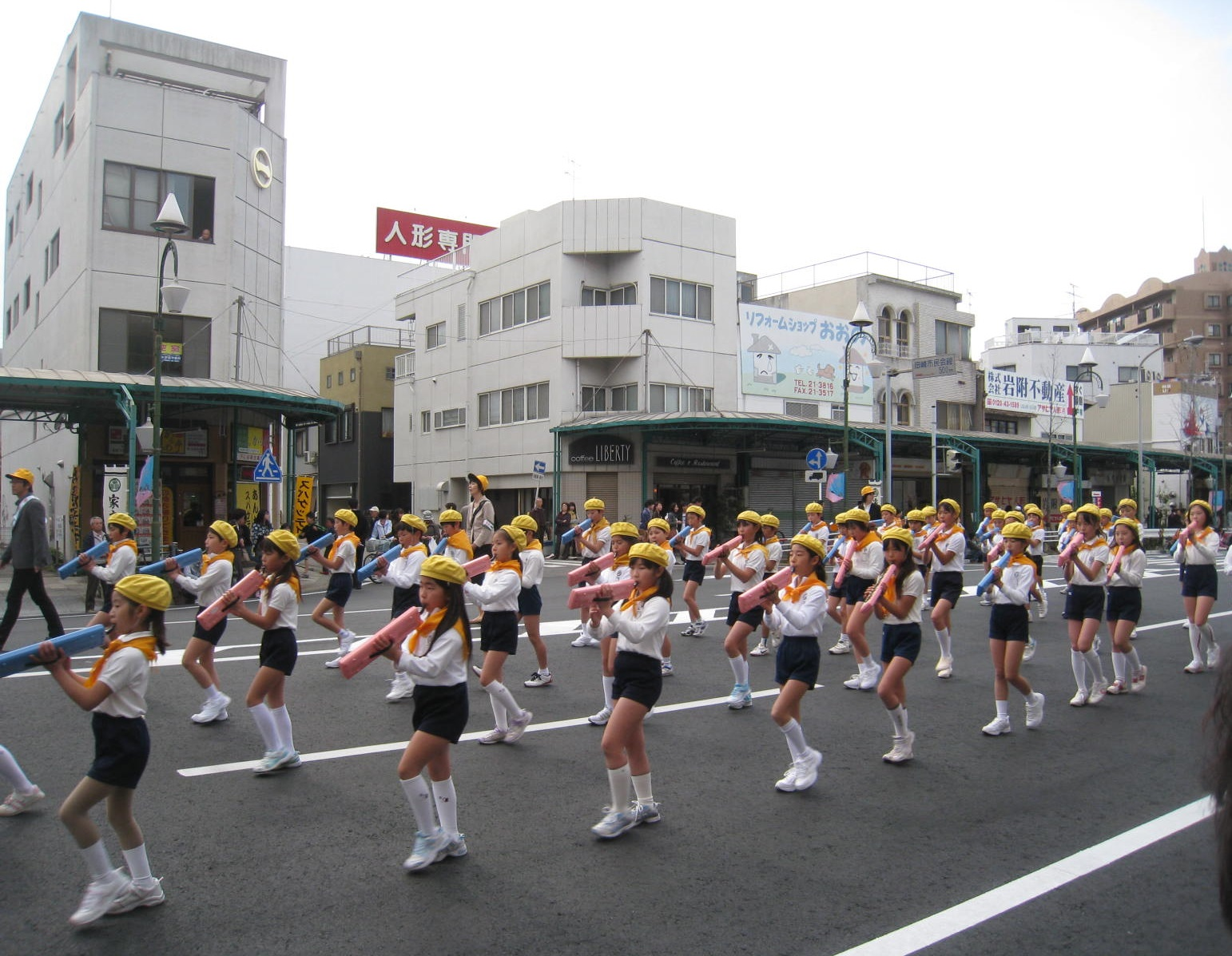 家康行列（岡崎市）